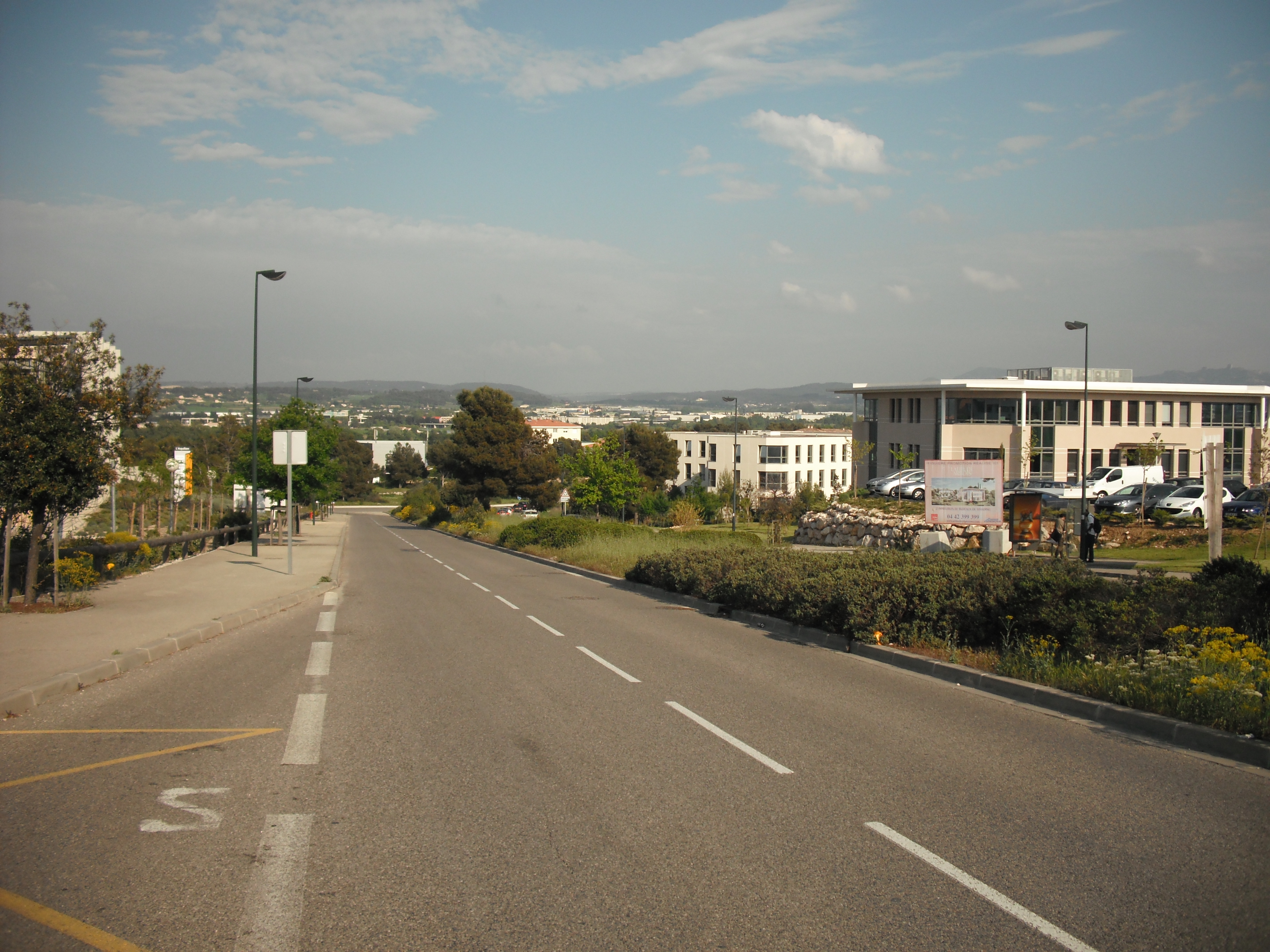 Quartier de la Duranne, Aix-en-Provence, France